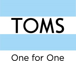 탐스 로고